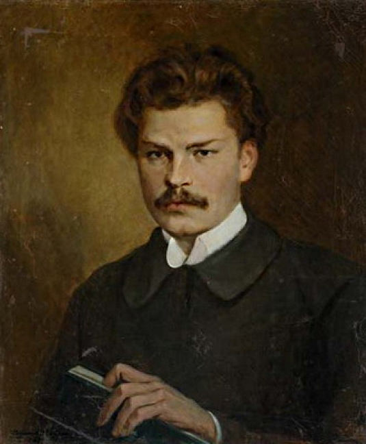 Валентин Викторович Волков (1881−1964). Портрет Максима Богдановича. 1927 г. НХМ РБ